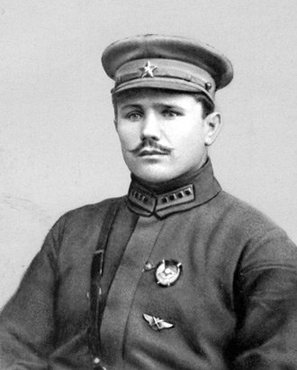 ЕРЁМЕНКО Андрей Иванович (1892 – 1970)